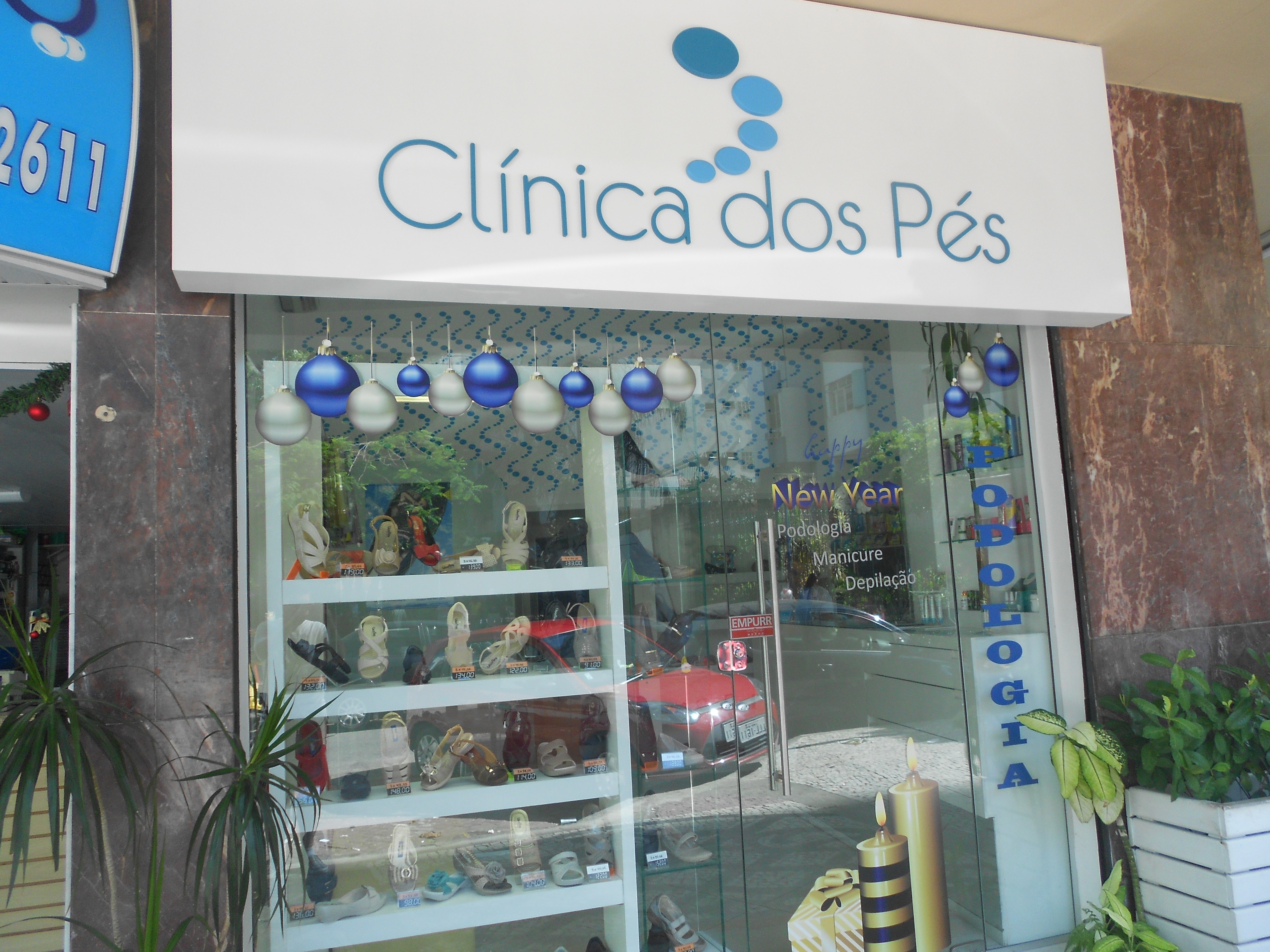 Clínica dos Pés - clínica de podologia, situado na Rua São Salvador, no Flamengo, Rio de Janeiro, Brasil.